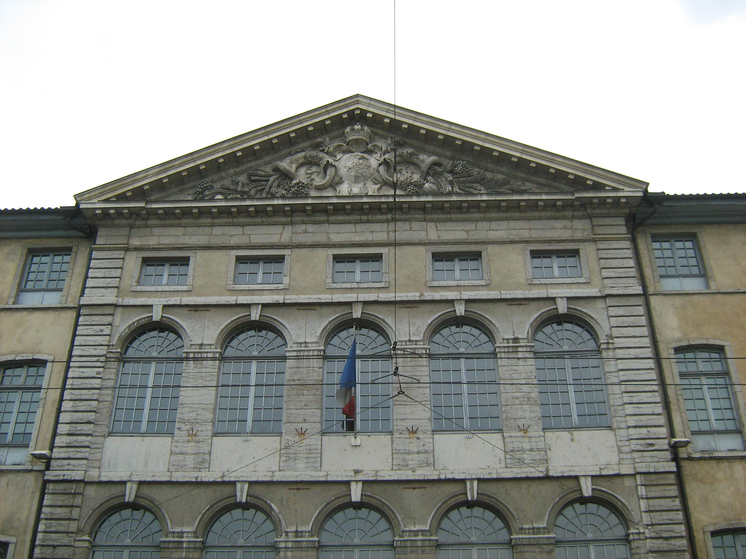 Détail de la façade des greniers d'Abondance, à Lyon.